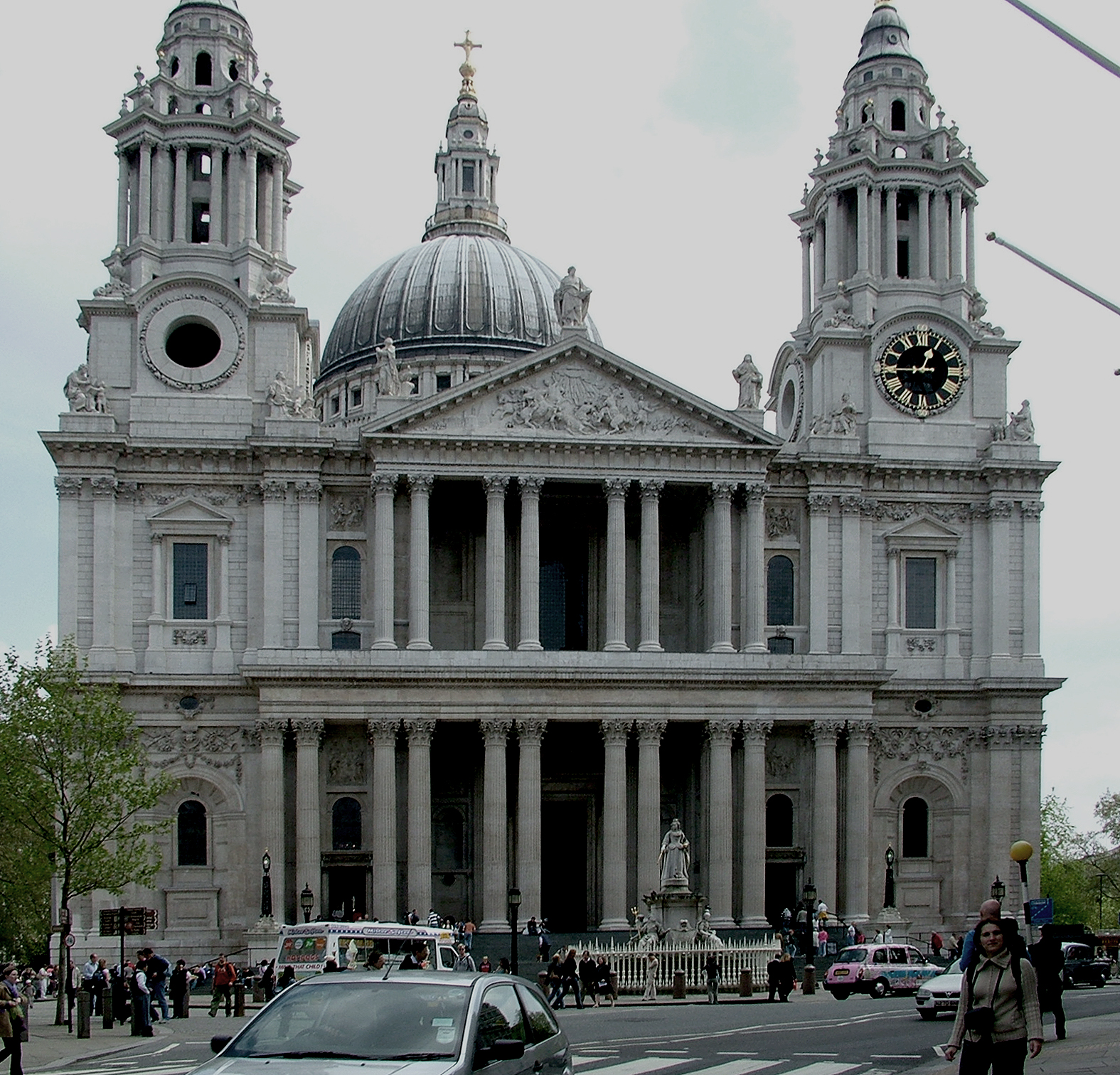 Szent Pál-székesegyház főhomlokzata, London